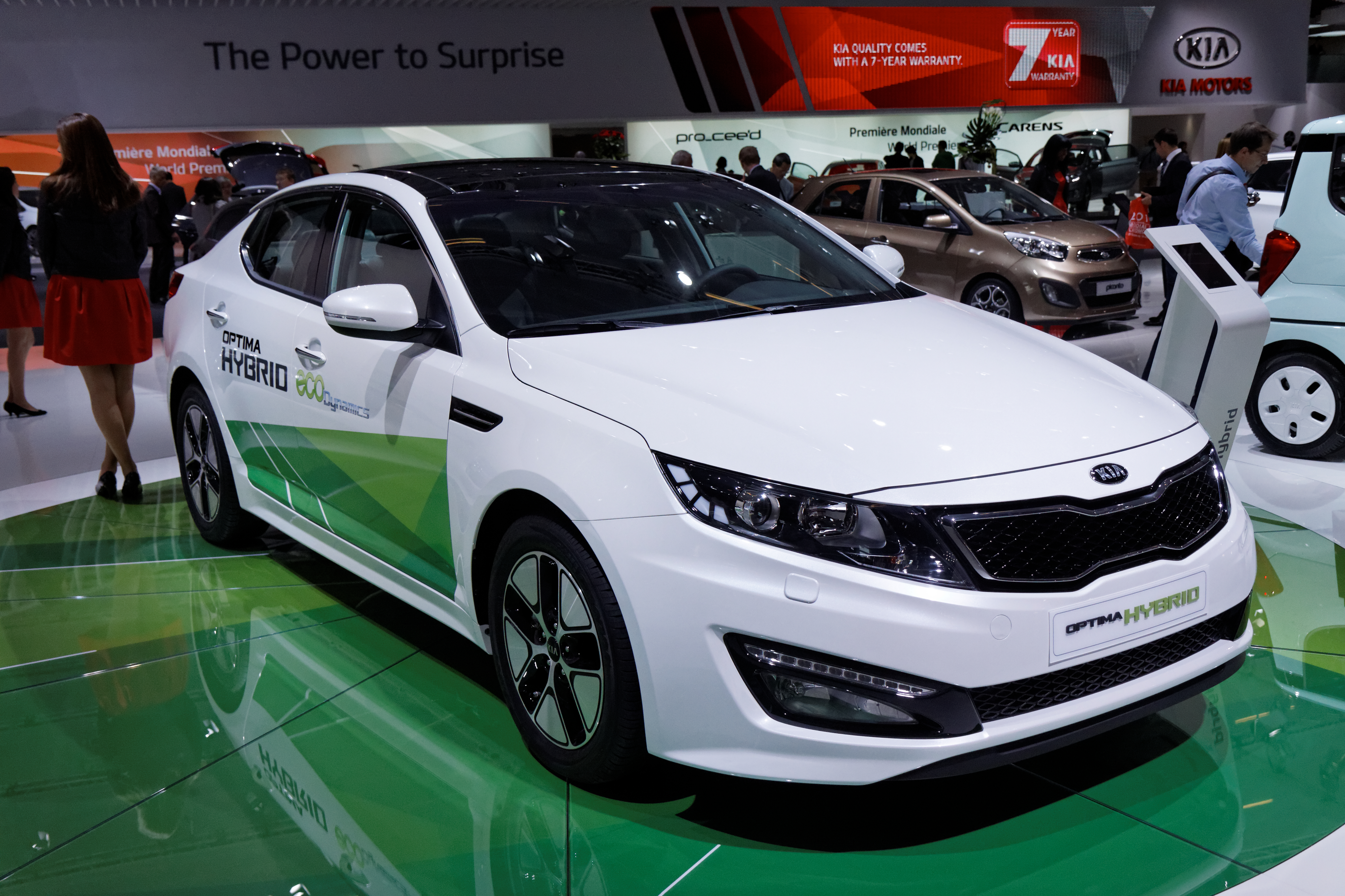 Une Kia Optima Hybrid présentée lors du Mondial de l'Automobile de Paris 2012.